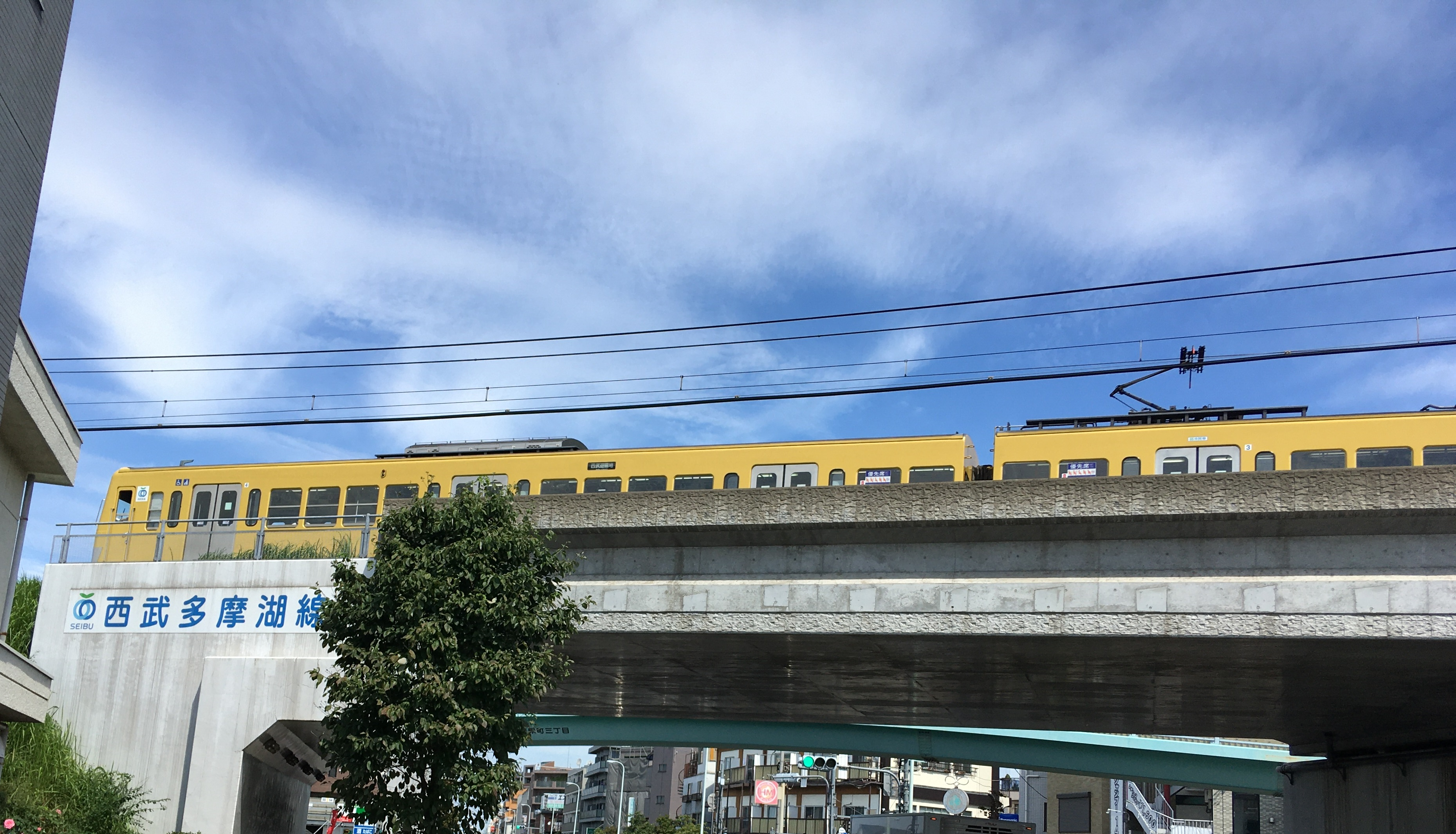 東村山市内の府中街道との立体交差地点